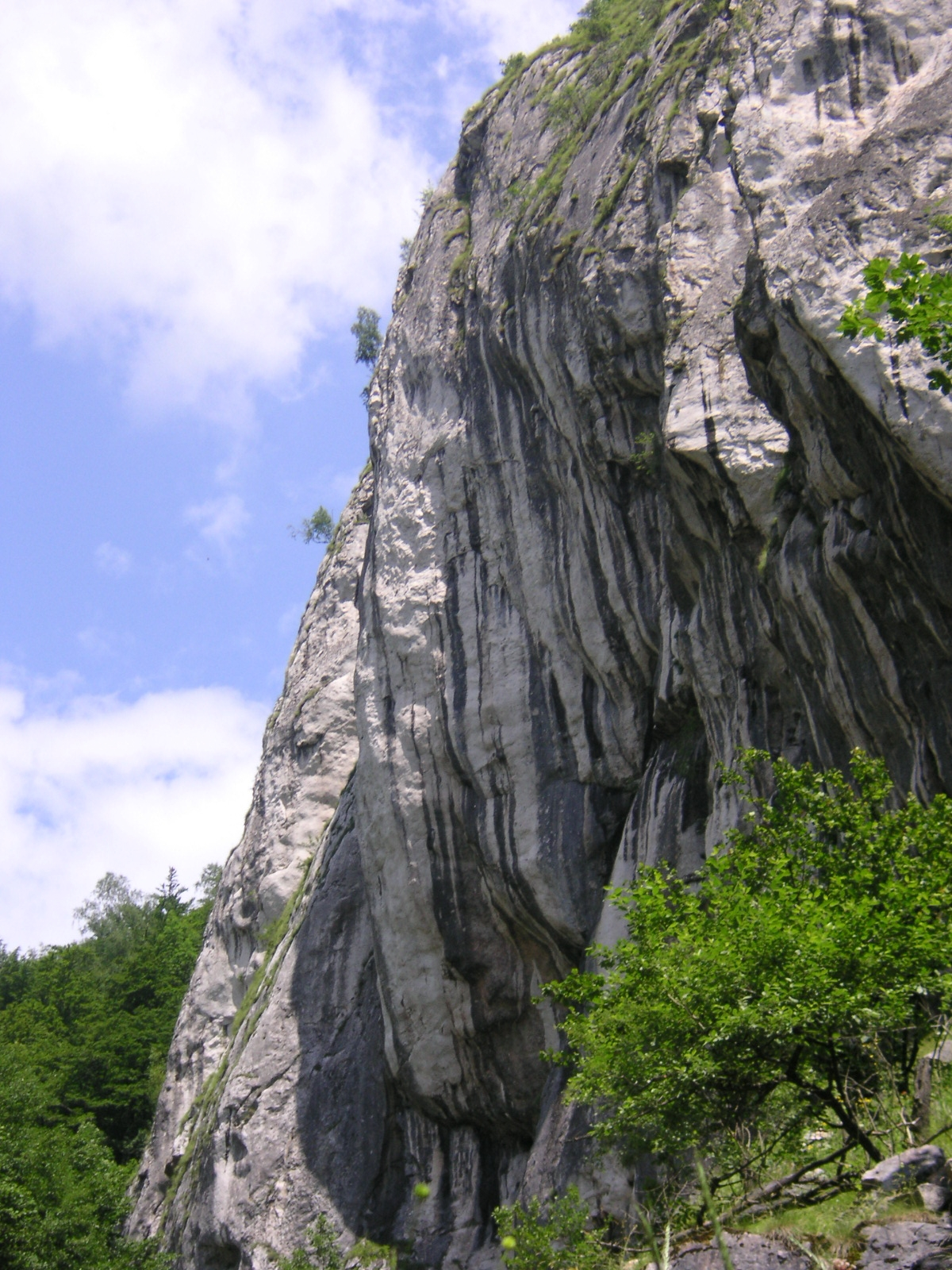 Cheile Rosiei-Muntii Sureanu-Petrosani-Hunedoara-Romania